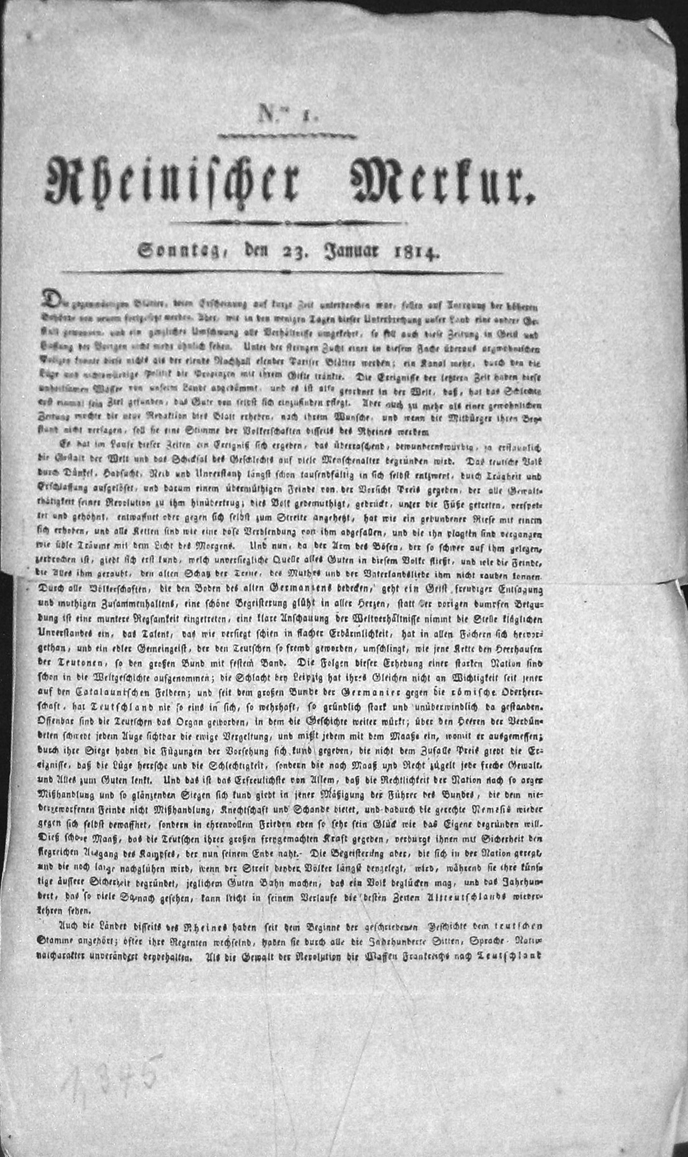 Erste Ausgabe des Rheinischen Merkur vom 23. Januar 1814. Ed. Joseph von Görres